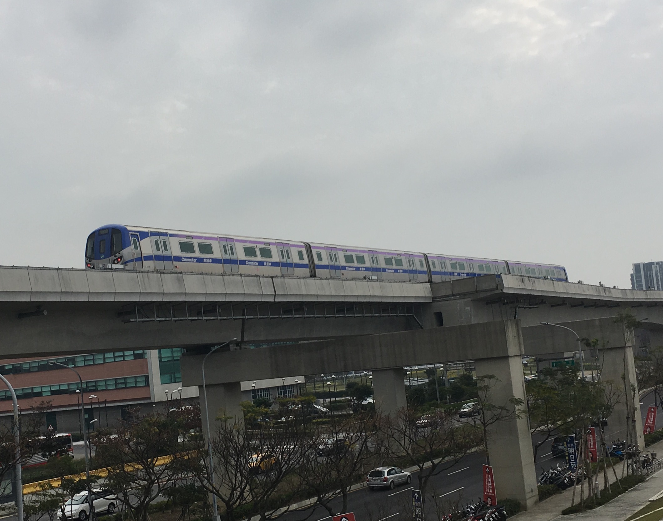 中文（台灣）: 桃園國際機場捷運普通車放大圖